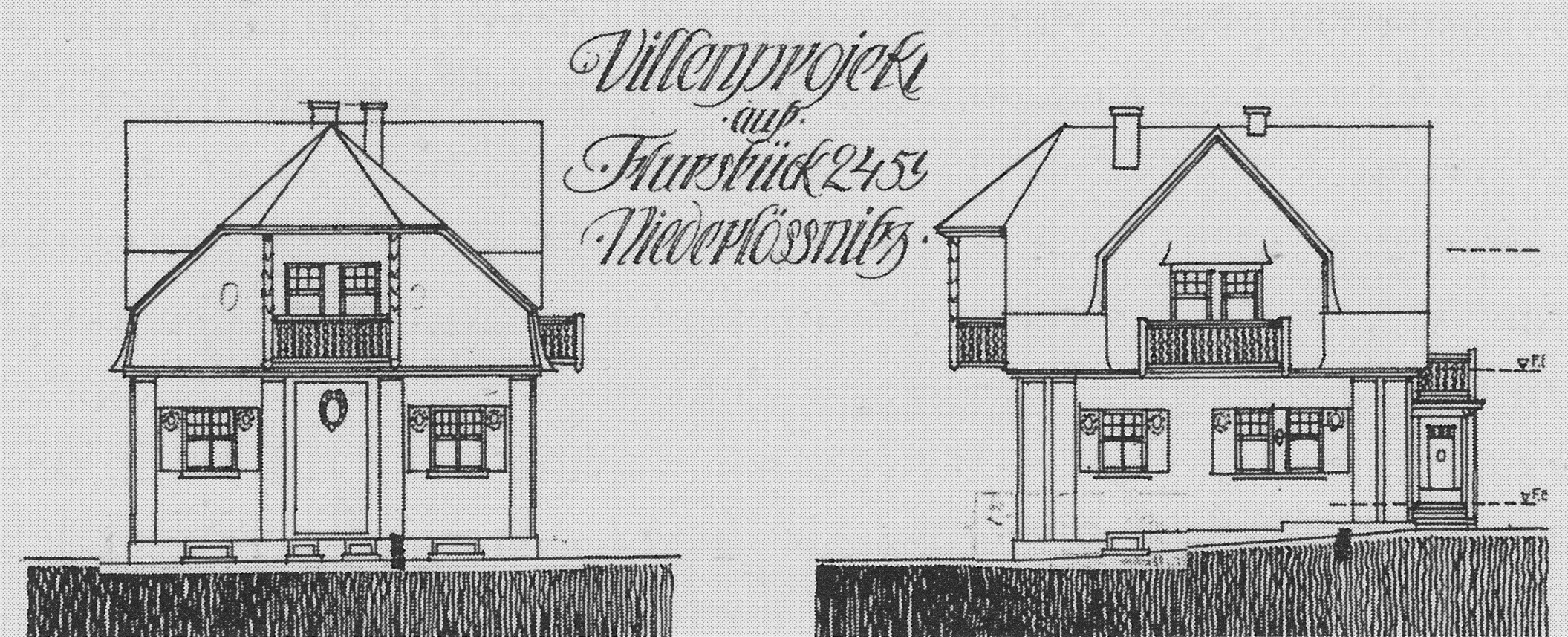 Radebeul Landhaus Lutzmann Bauzeichnung 1906